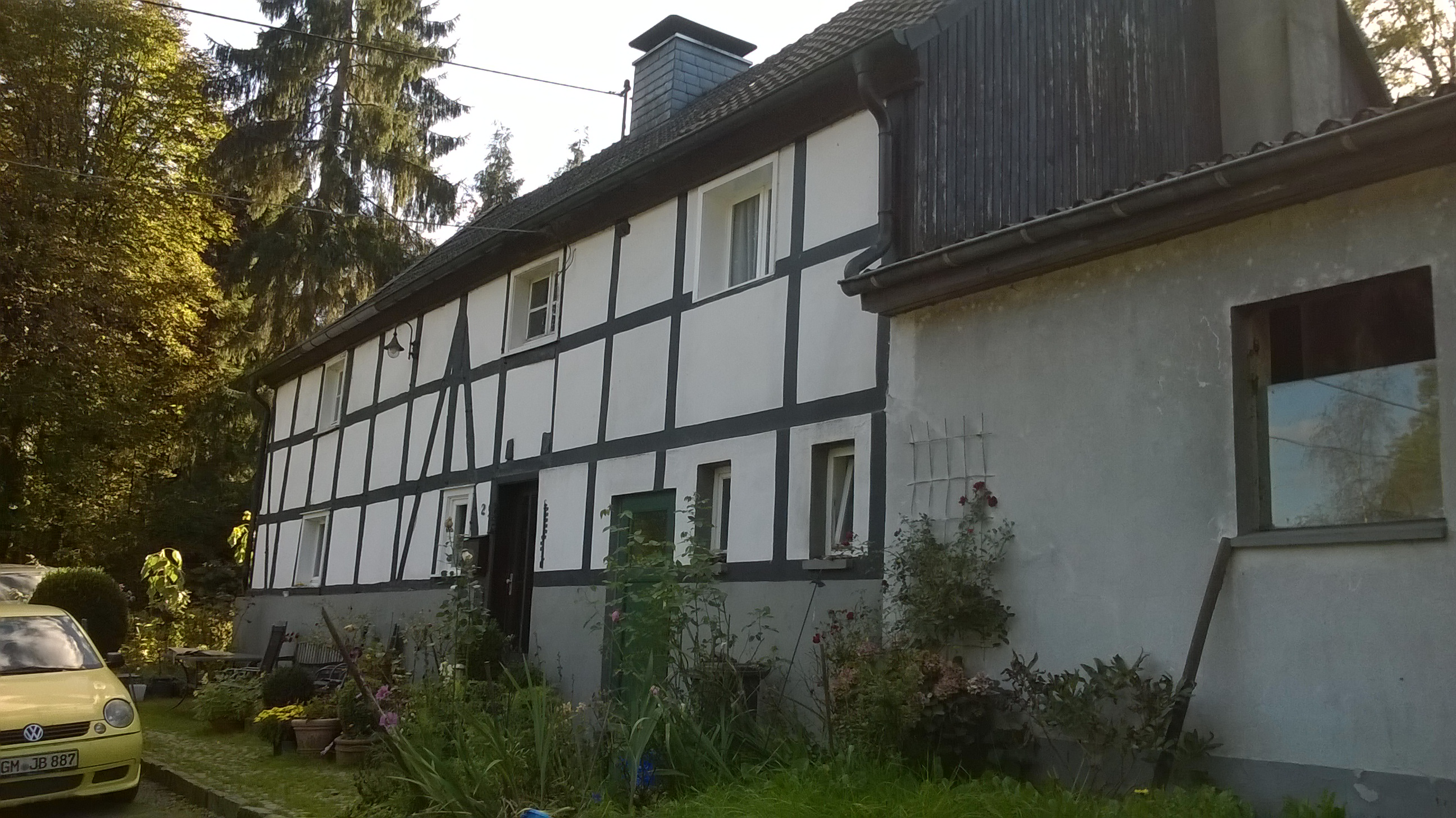 Denkmalgeschütztes Bergisches Fachwerkhaus in Haus Leppe 2This is a photograph of an architectural monument., no. 0